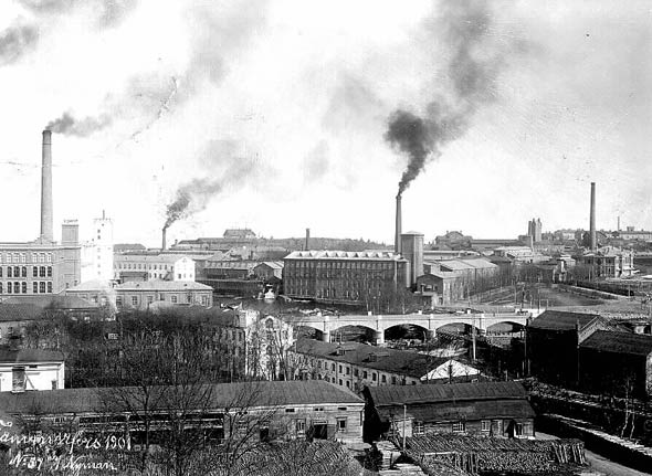 Tehtaita Tampereella vuonna 1901